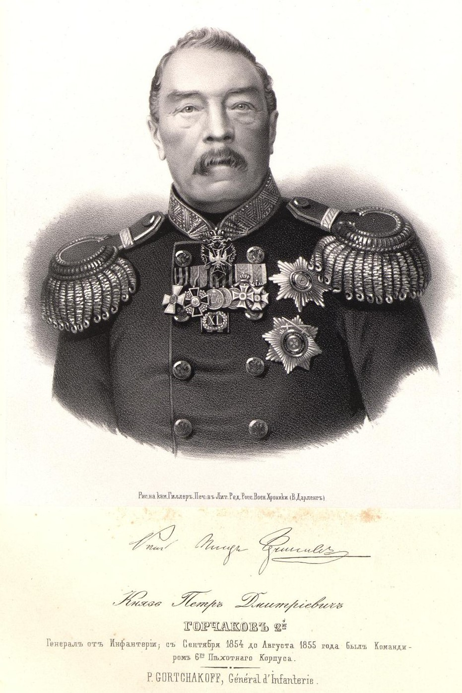 Piotr D. Gortchakov.